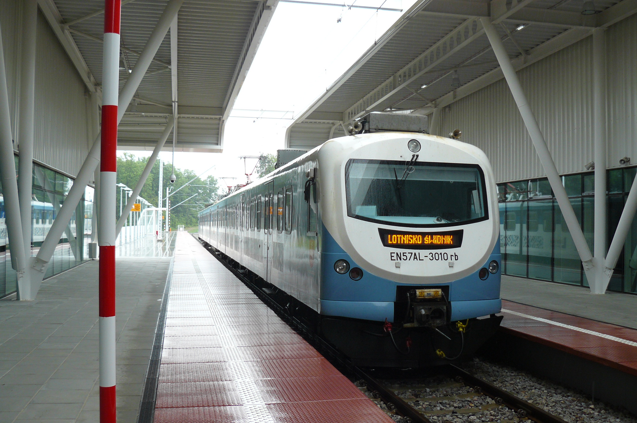 EN57AL-3010 jako pociąg z Lublina do Świdnika Portu Lotniczego.